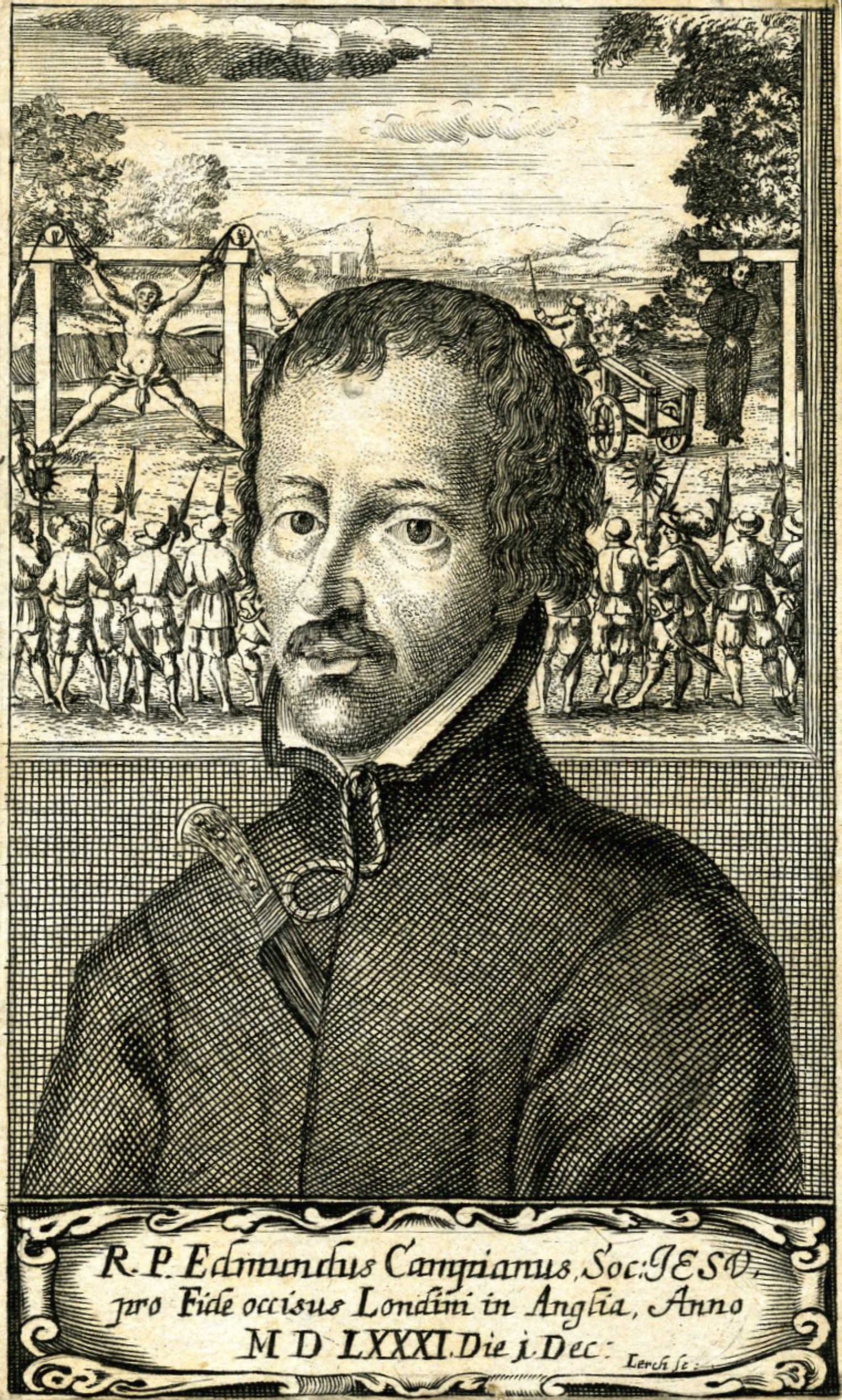 Edmund Campion (* 1540; † 1581), britischer Jesuit